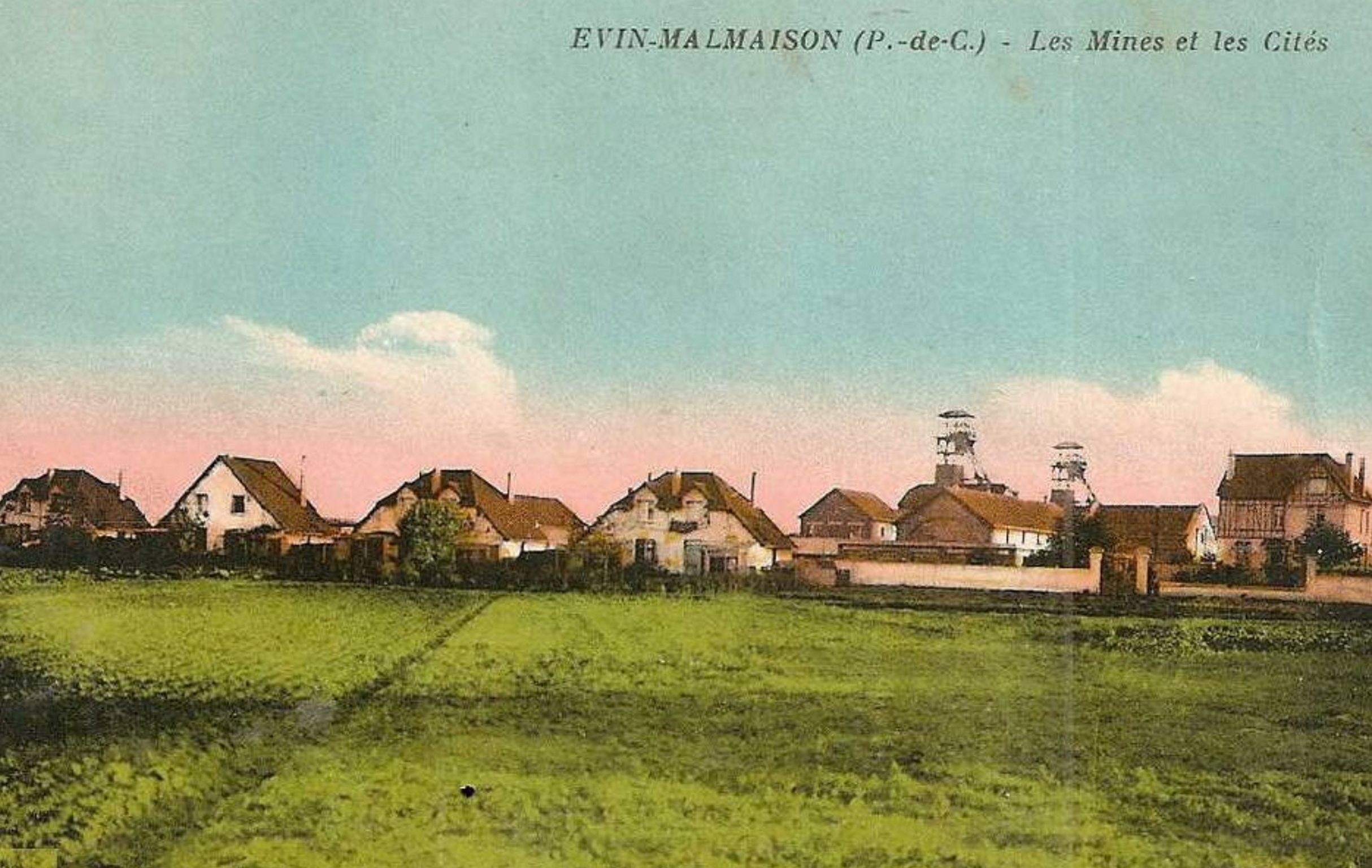 La fosse n° 8 - 8 bis de la Compagnie des mines de Dourges était un charbonnage constitué de deux puits situé à Évin-Malmaison, Pas-de-Calais, Nord-Pas-de-Calais, France.